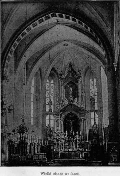 Бережани фара головний вівтар (до 1905)